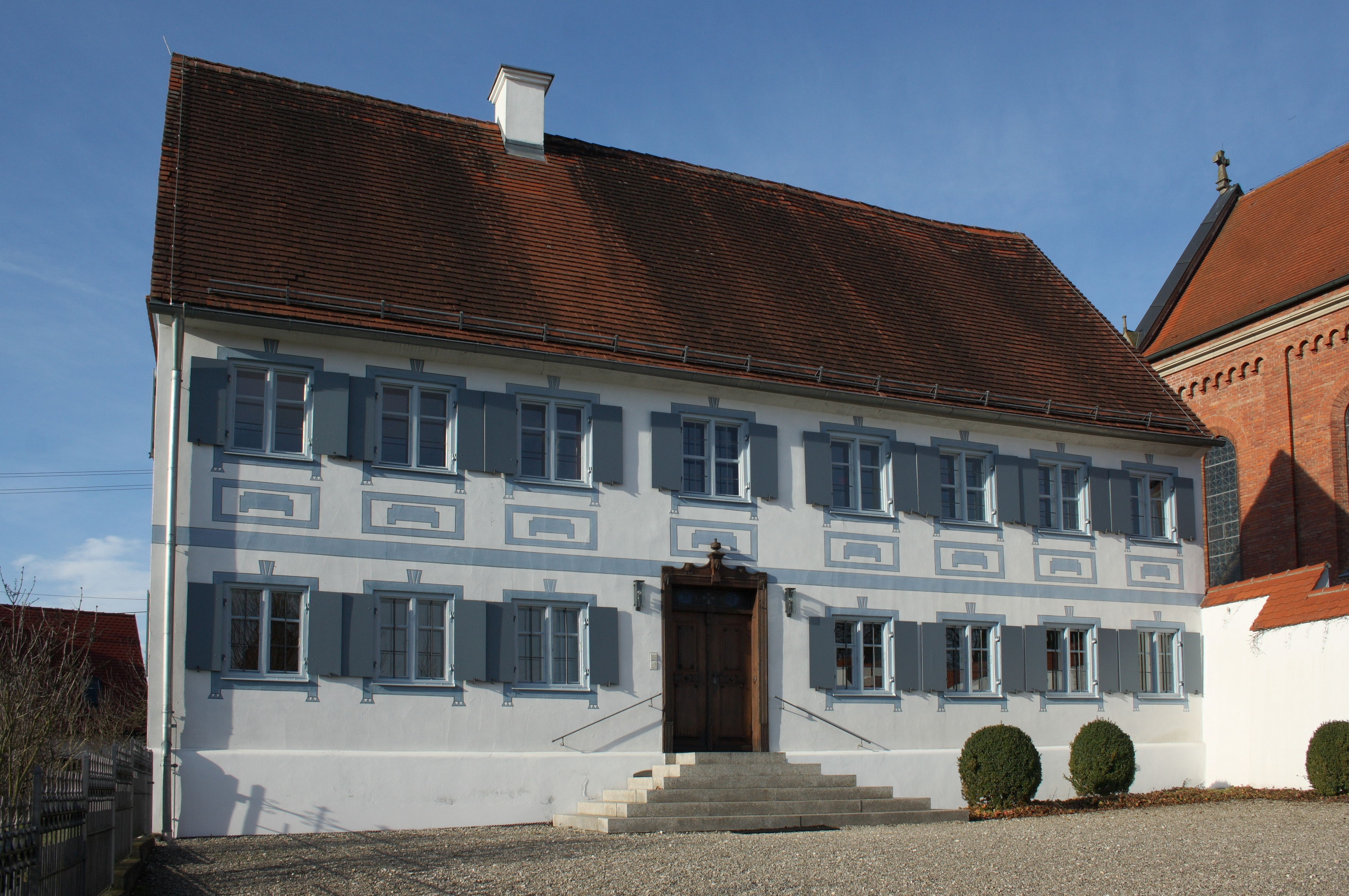 Pfarrhaus in Winterbach im Landkreis Günzburg (Bayern), Ende 18. Jahrhundert